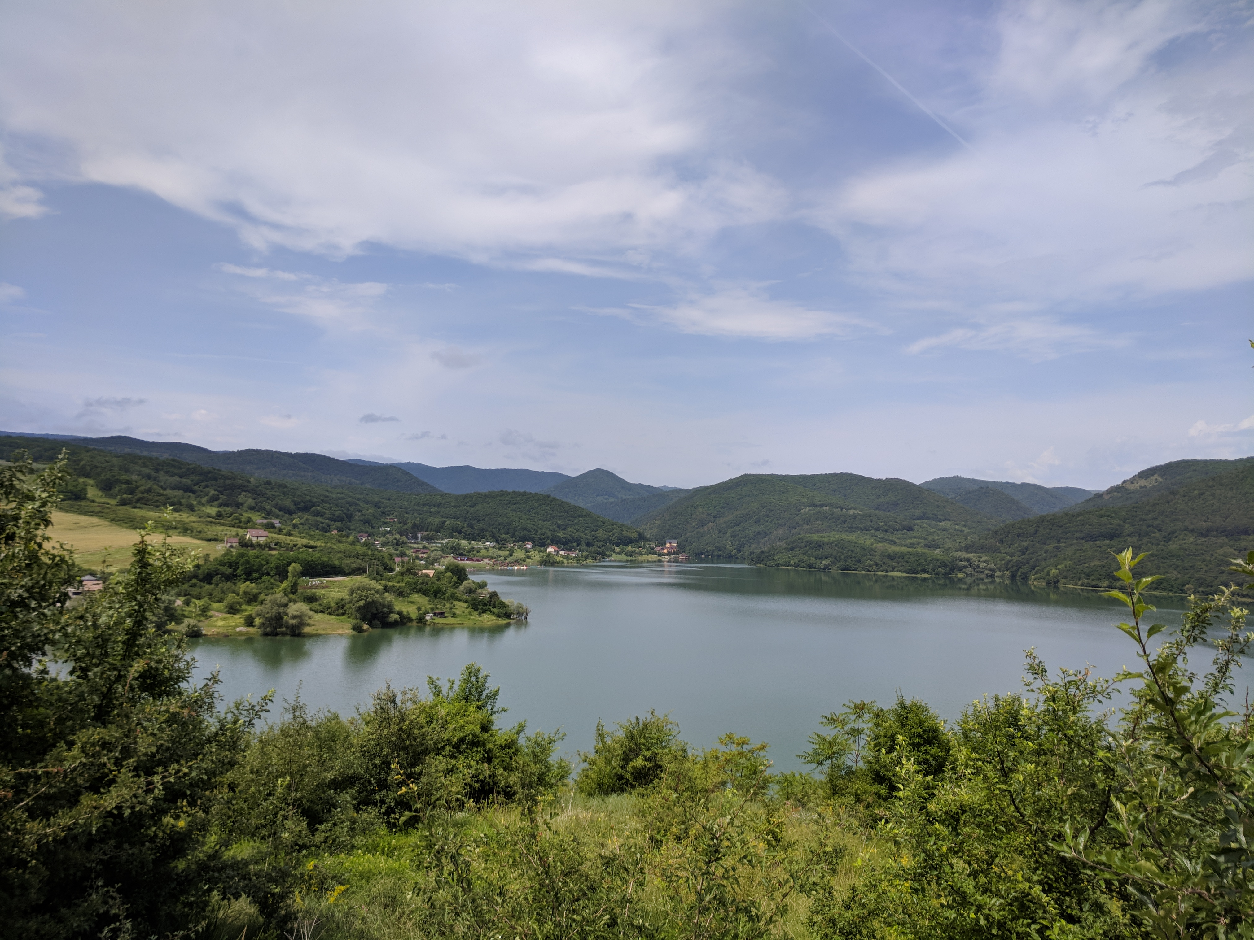 A view of the lake on a sunny early afternoon